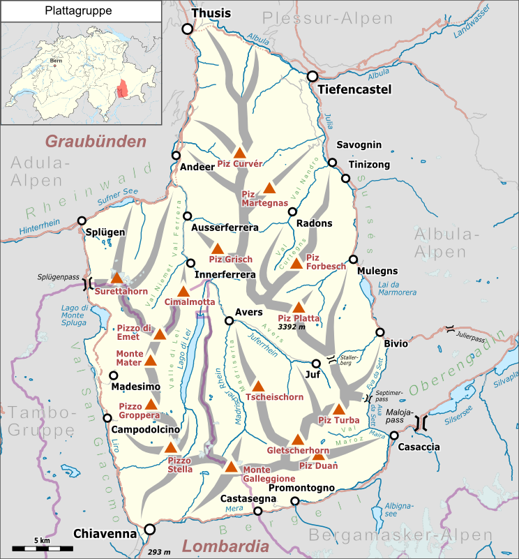 Lagekarte der Plattagruppe